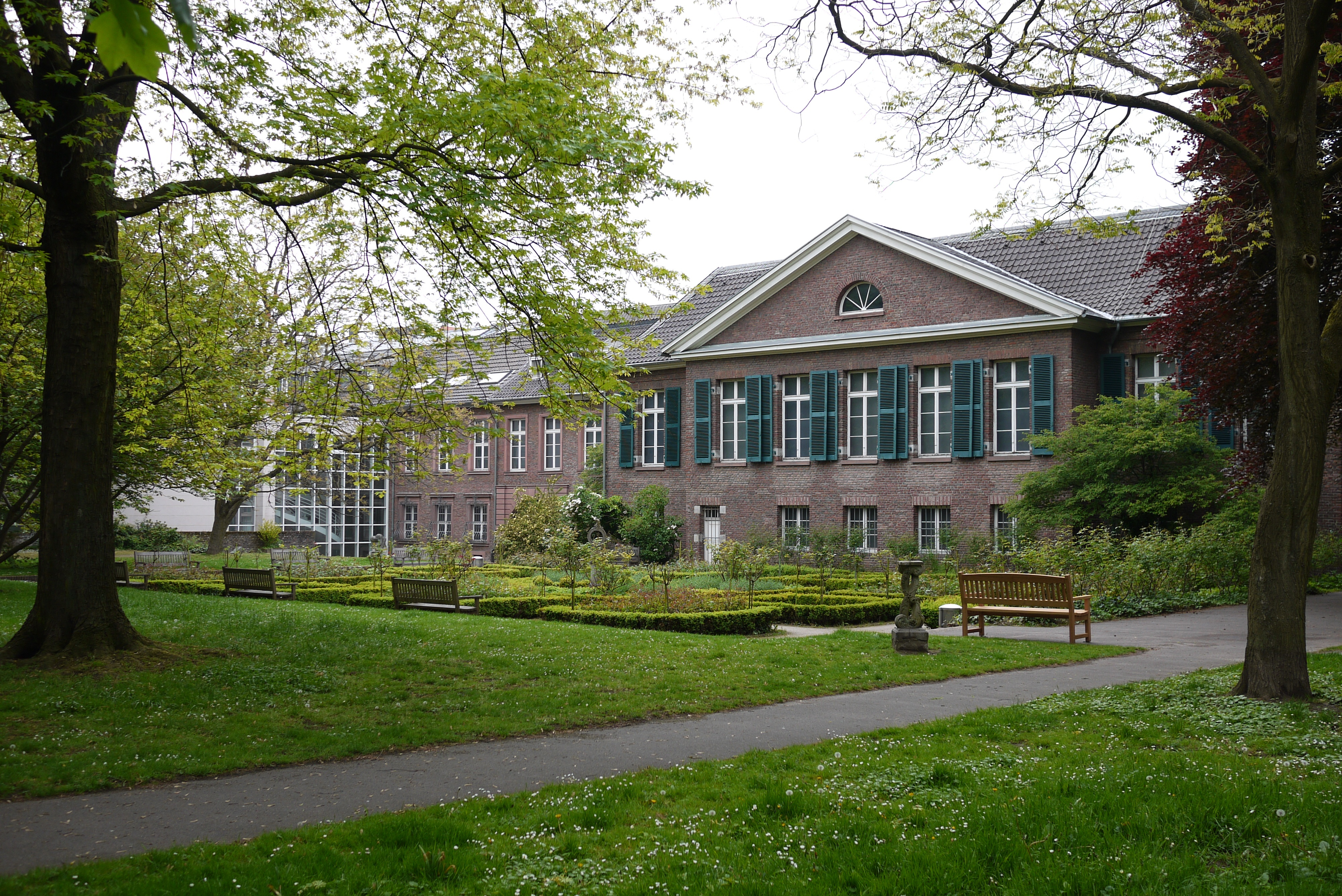 Stadtmuseum DüsseldorfNative nameStadtmuseum Landeshauptstadt DüsseldorfLocationDüsseldorf, GermanyCoordinates51° 13′ 19.68″ N, 6° 46′ 10.14″ EEstablished1874 as Historisches MuseumWebsiteStadtmuseum Düsseldorf